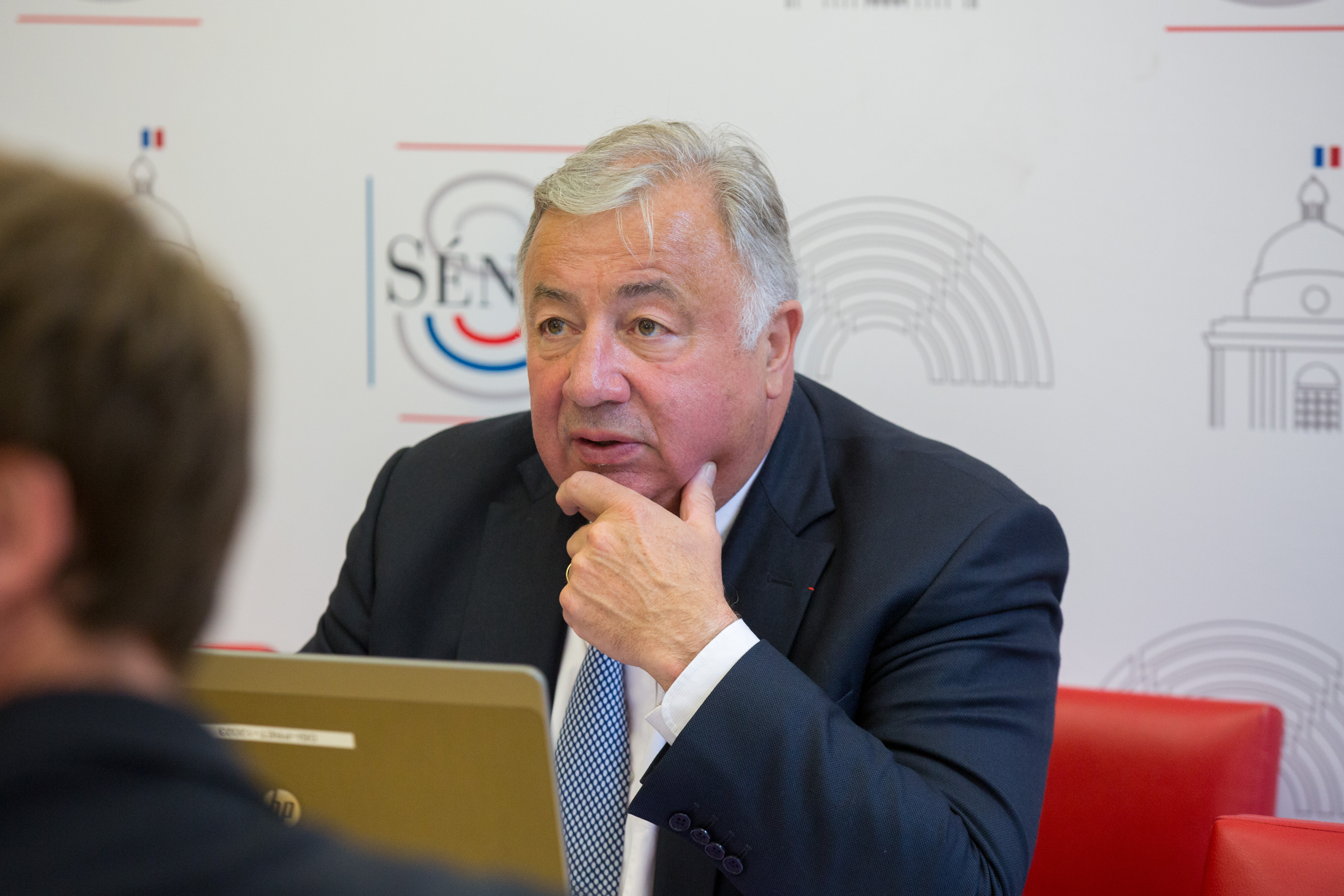 En séance de questions-réponses Twitter - 2015